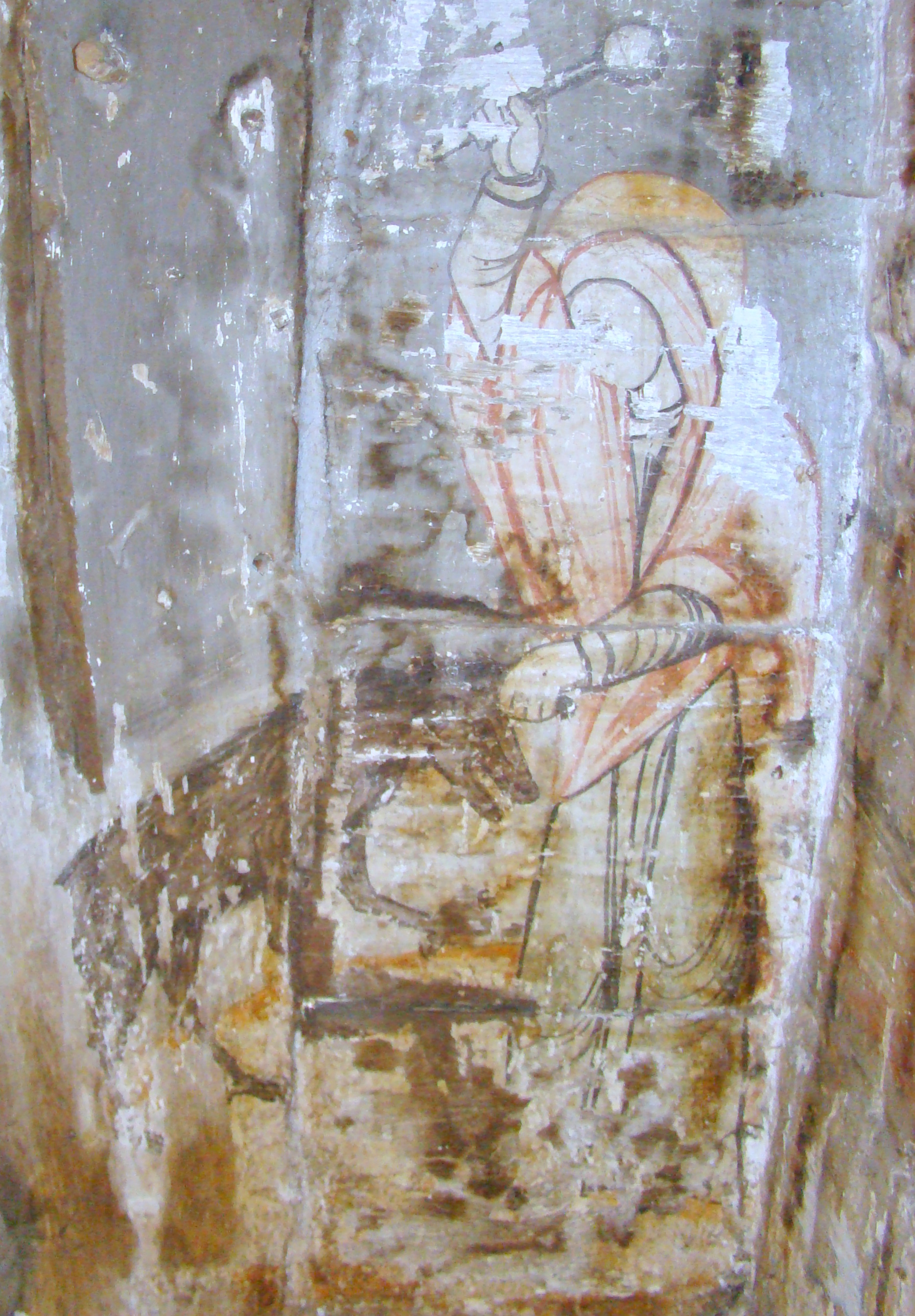 Biserica de lemn "Sfinții Arhangheli Mihail şi Gavriil" din Hida, județul Sălaj